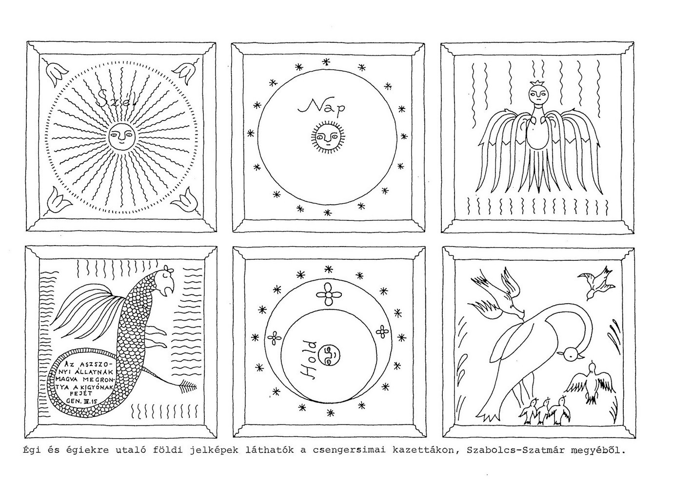 Mennyezetkazetták rajza Csengersimáról